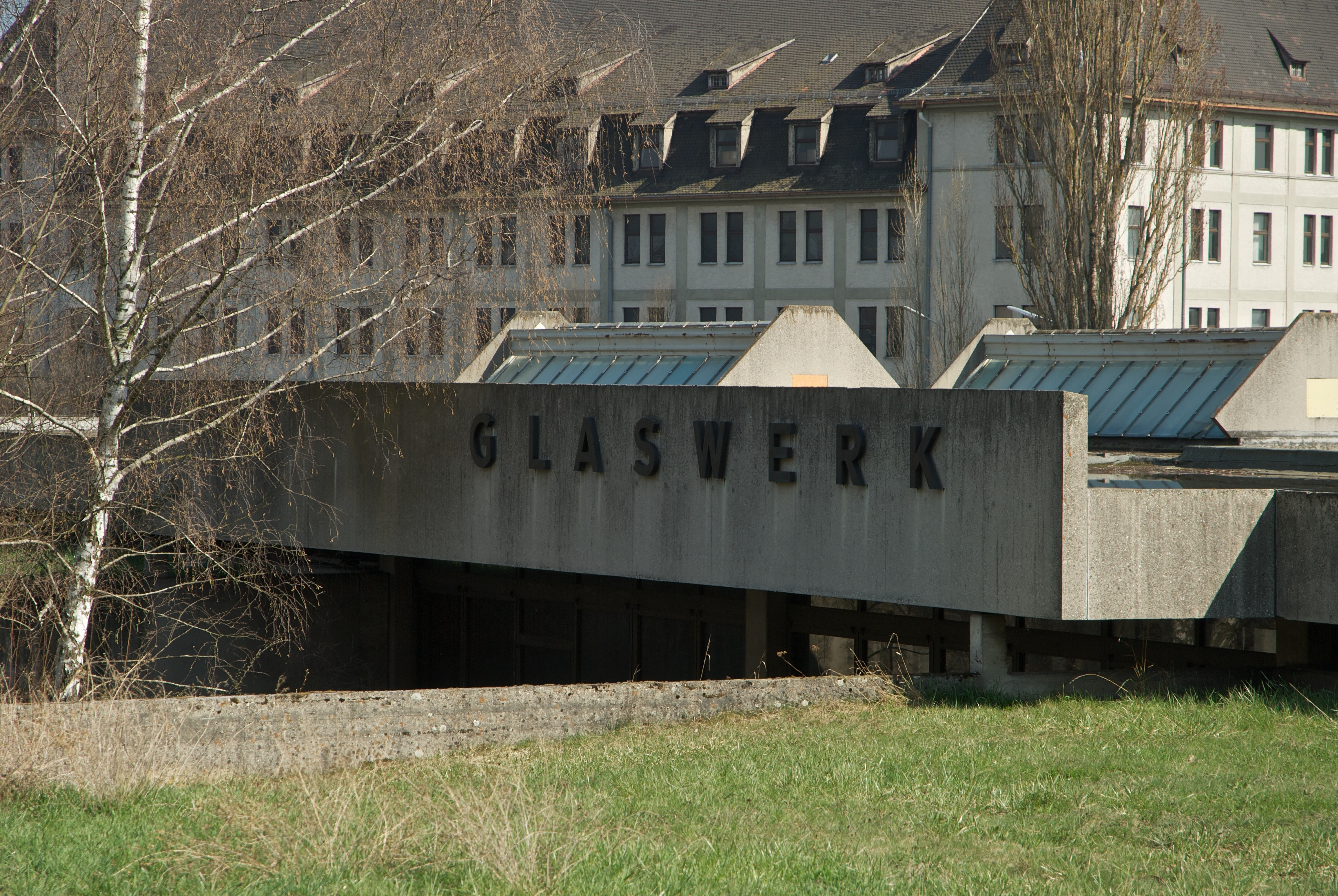 Glaswerk, Entwurf Walter Gropius 1967, Amberg/Opf.This is a photograph of an architectural monument.